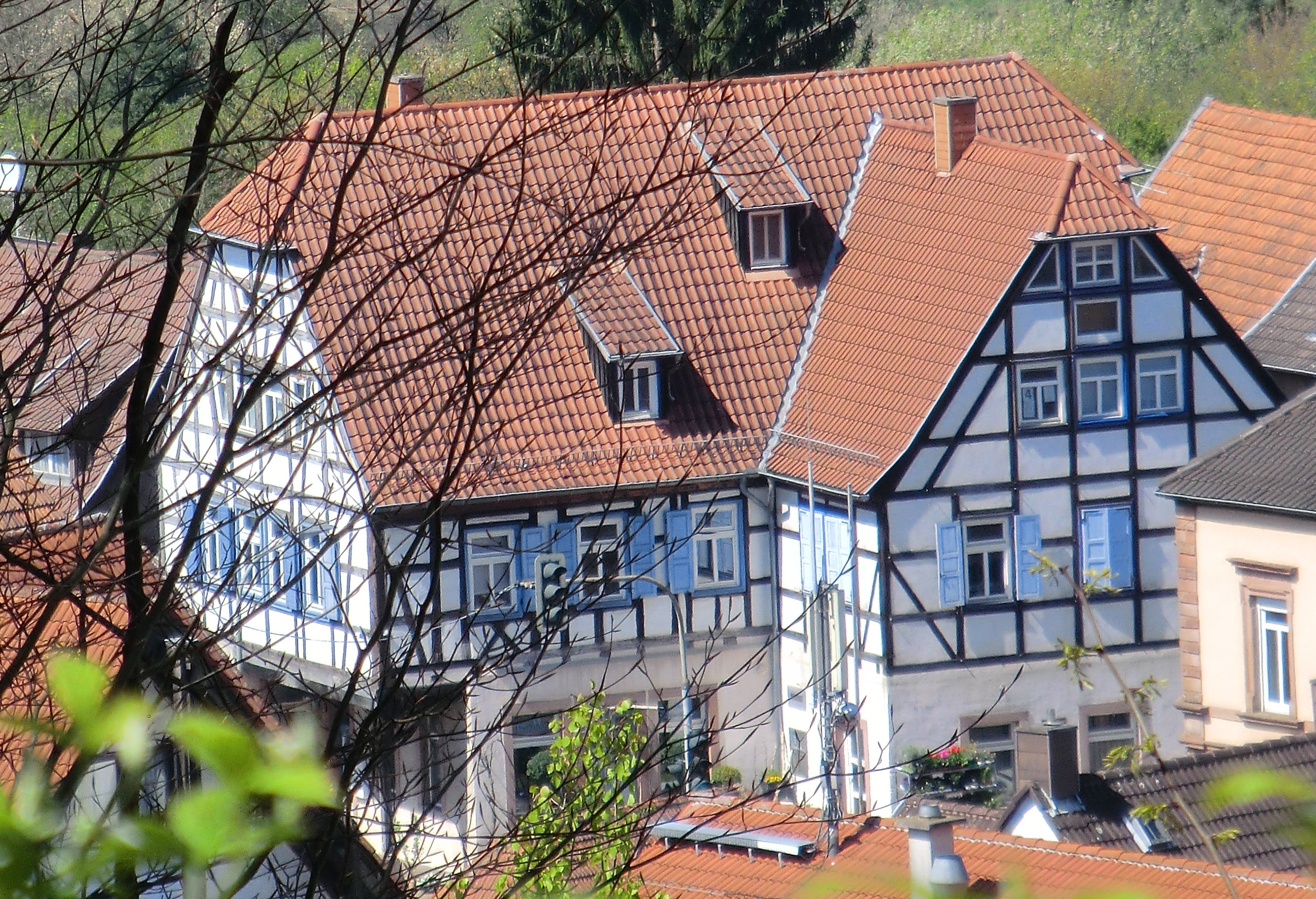 Kaiserstrasse 65